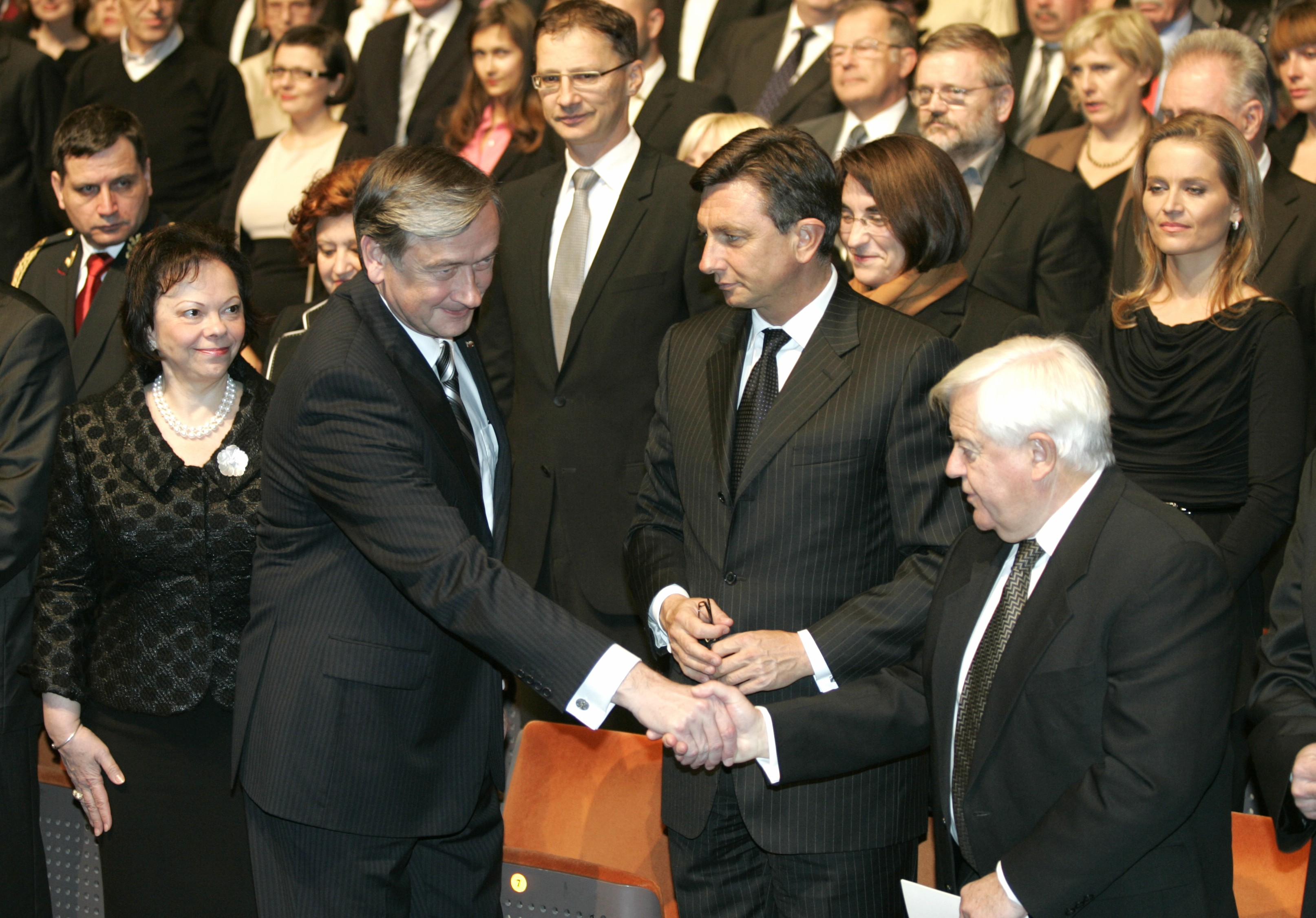 Državna proslava ob dnevu reformacije 2010